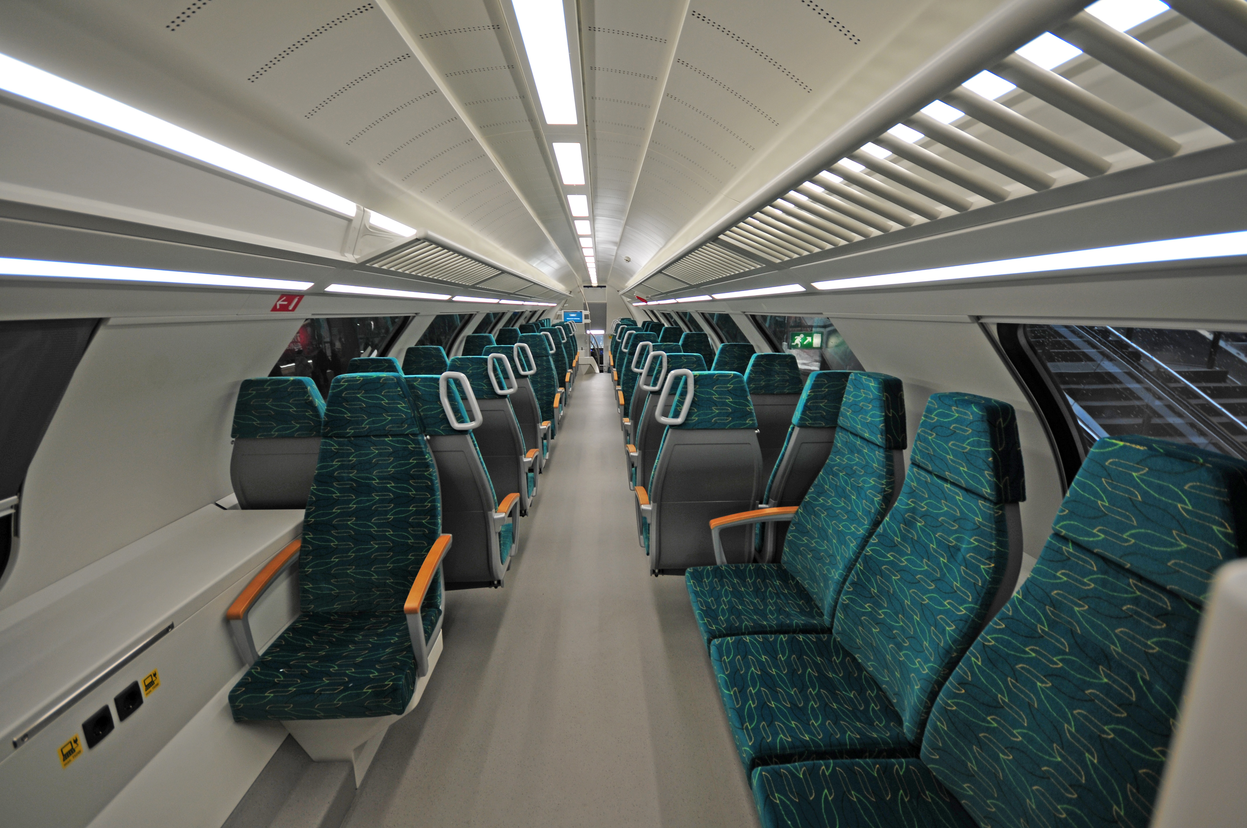 Zug der ODEG im Berliner Hauptbahnhof